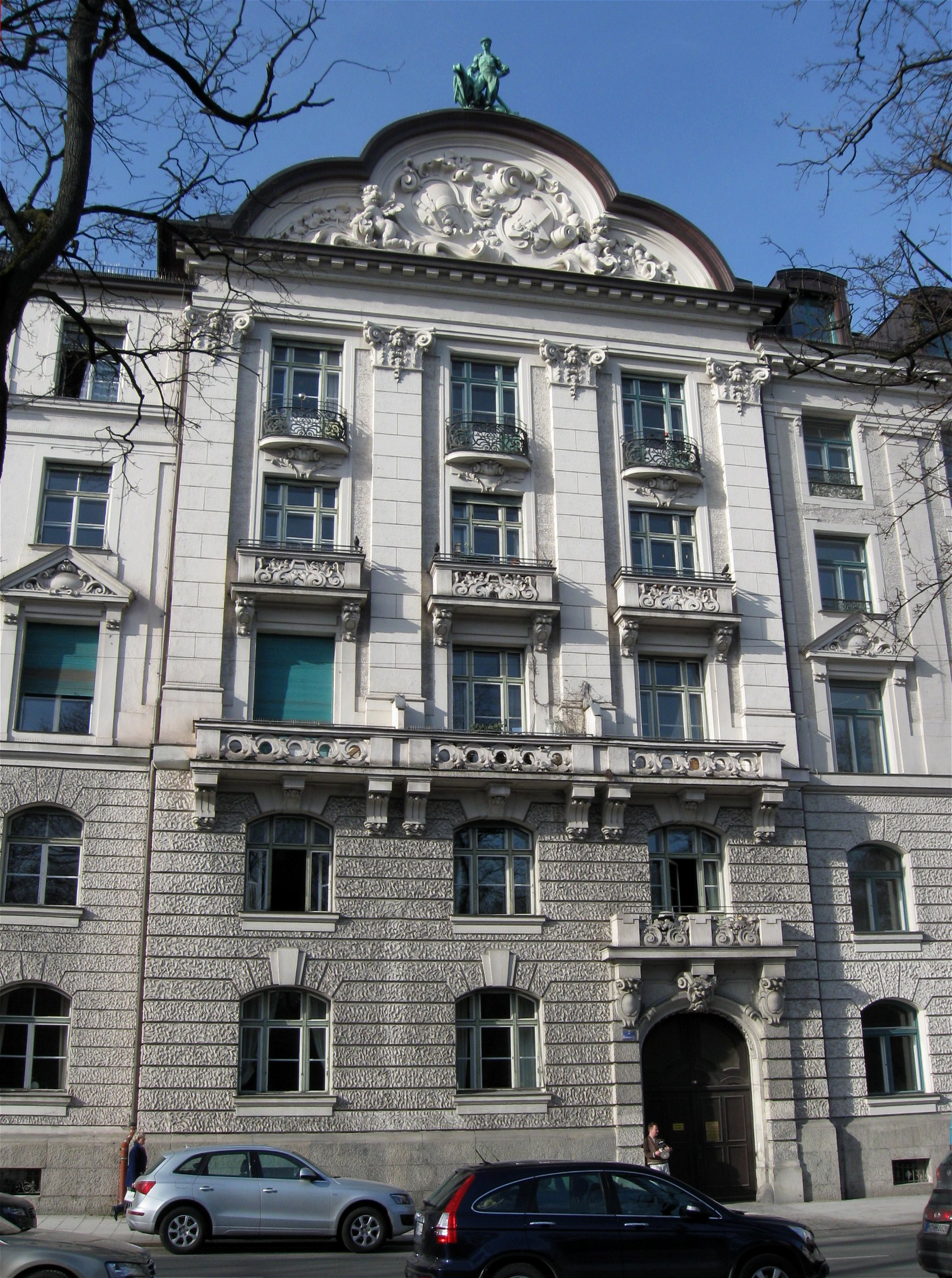 Widenmayerstraße 2; Mietshaus, monumentaler Neubarockbau, reich gegliedert, 1898 von August Nopper; samt Eingangsloggia im Hof und Rückgebäude; Gruppe mit Nr. 3.